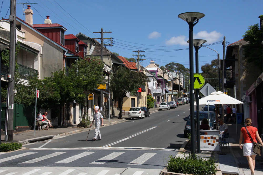 Darling Street